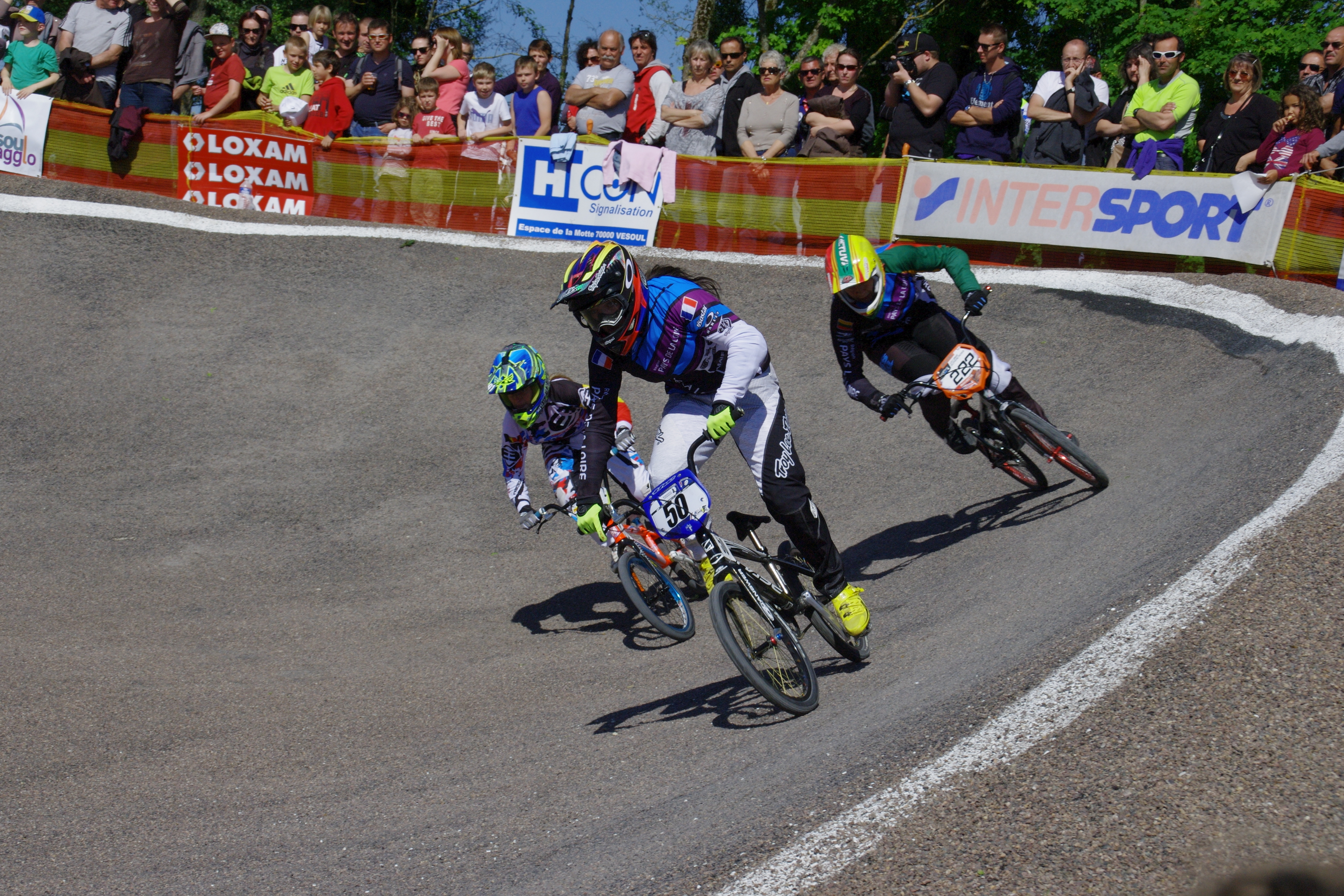 Magalie POTTIER devant Vilma RIMSAITE et Elke VAN HOOF